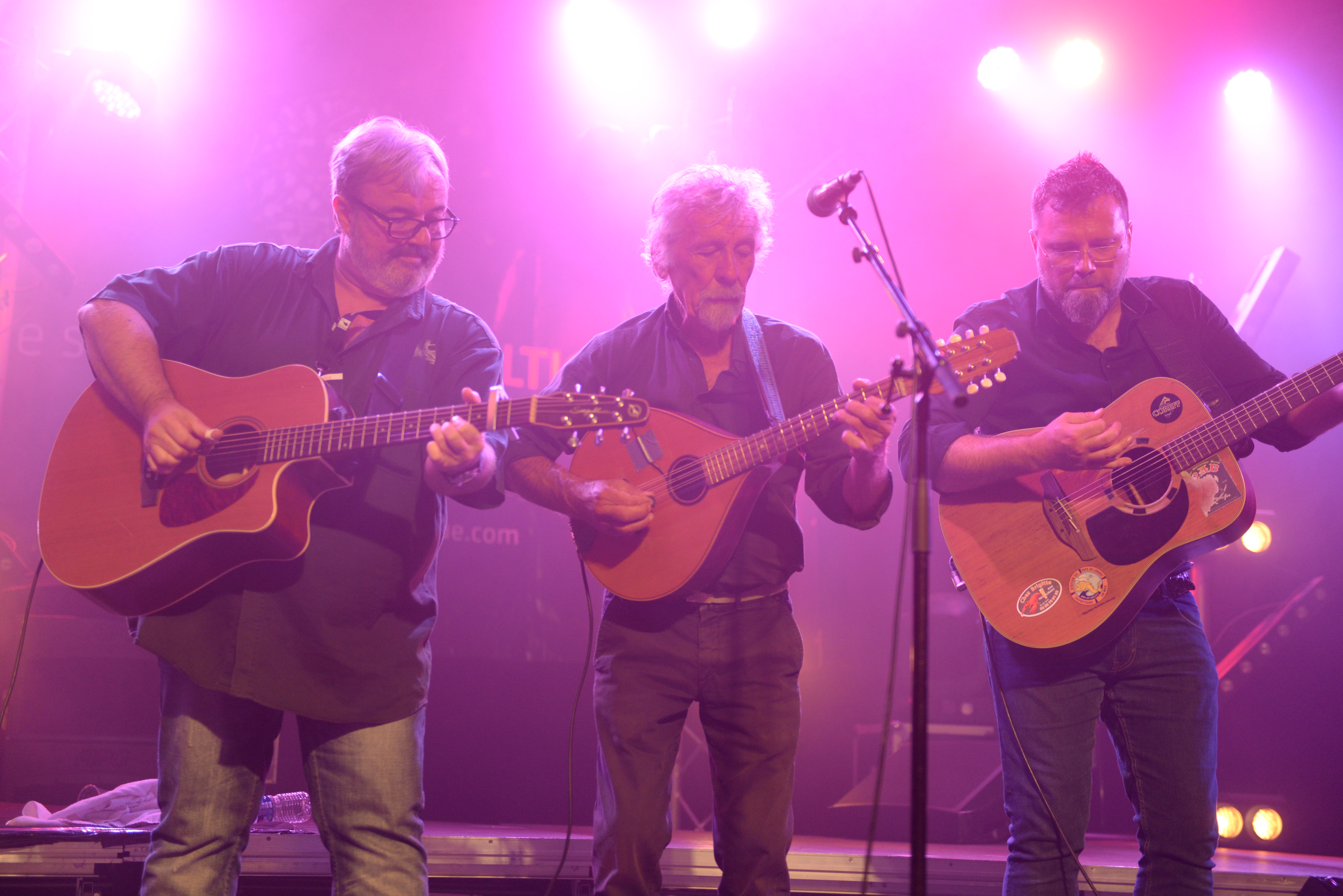 Festival interceltique de Lorient d'août 2016 - Concert final du groupe breton Djiboudjep - Quai de la Bretagne